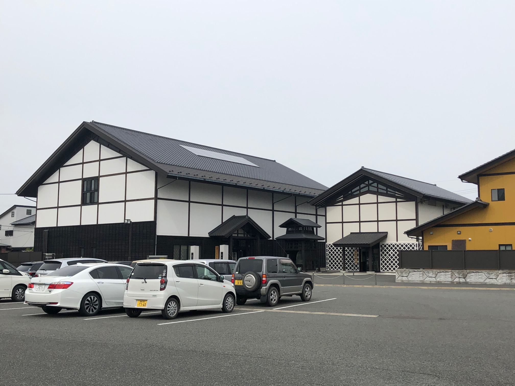 相馬市歴史資料収蔵館と郷土蔵を映した画像